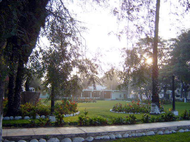 Biblioteca Municipal de Chaclacayo Fuente: Nestor Ulaf Salcedo Zuta. Colección personal. Junio 2006 La foto fue tomada con la camara Samsung de mi enamorada el 14 de Junio de 2006